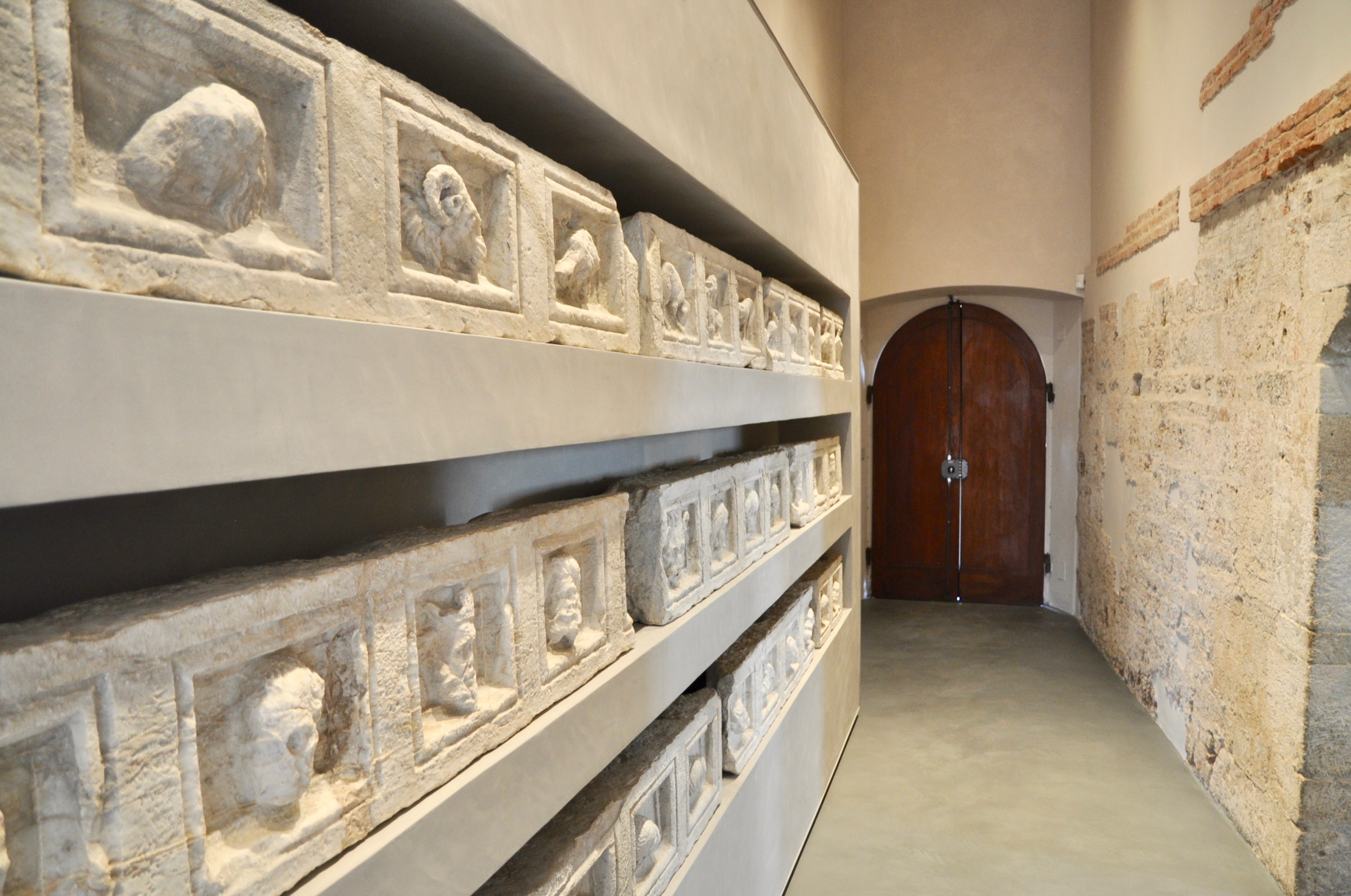 Una delle sale del Museo dell'opera del duomo con le Gradule provenienti dal duomo di Pisa. Opera di Giovanni Pisano iniziata nel 1298 e rimossa dalla suo posizione originaria nel corso del XIX secolo